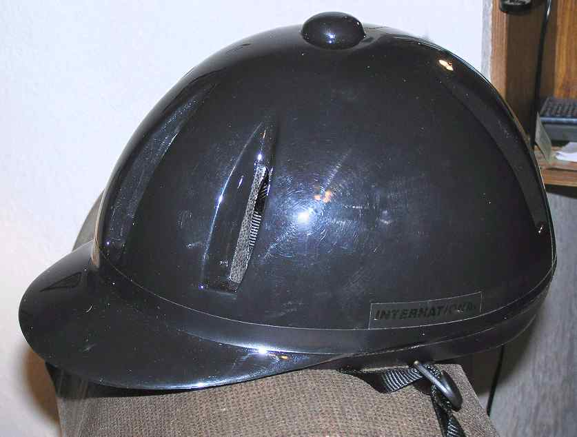 ASTM/SEI approved safety Helmet for riding horses